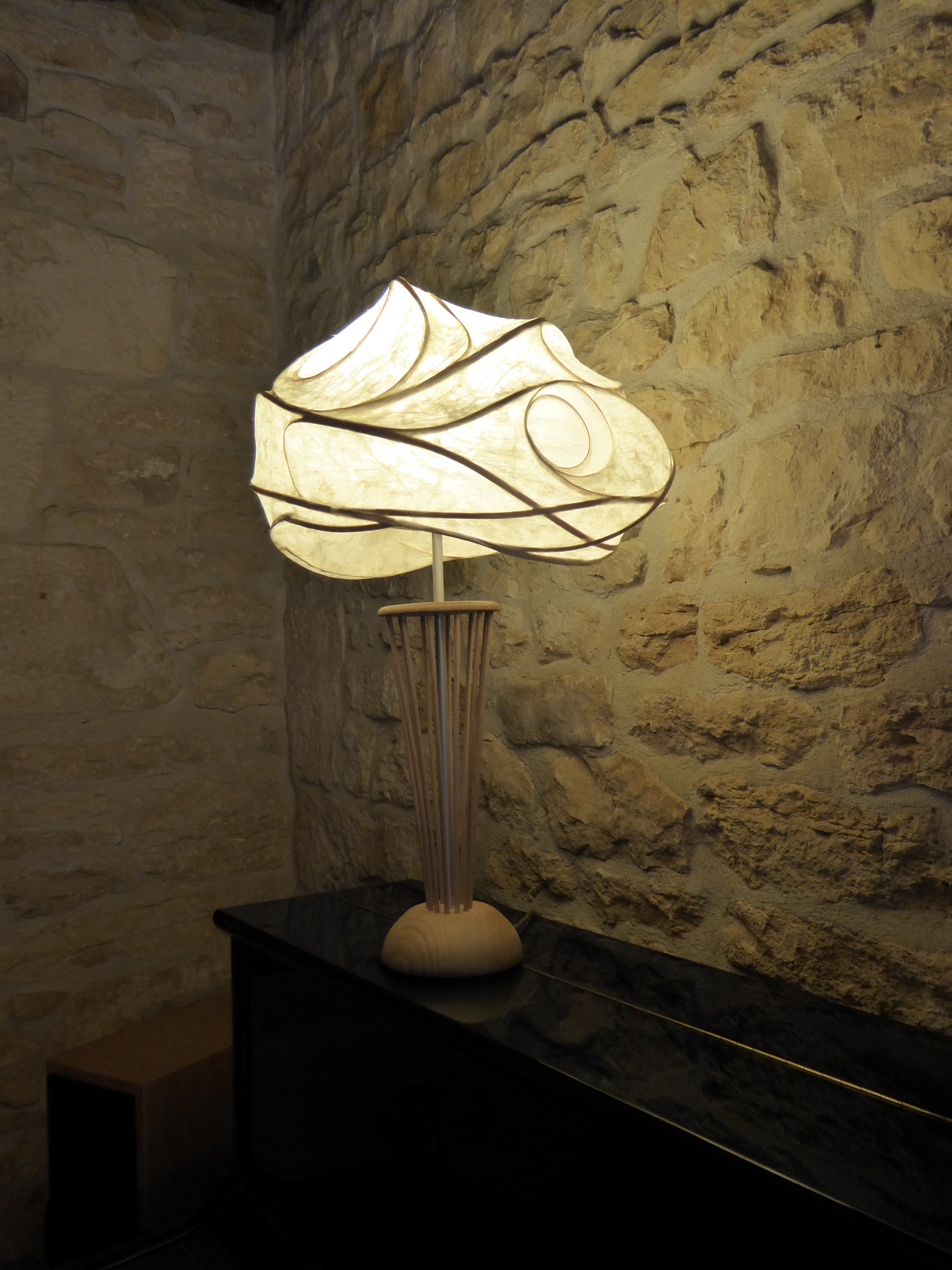 Lampe réalisée en papier japonais Washi (fibres naturelles de gampi)